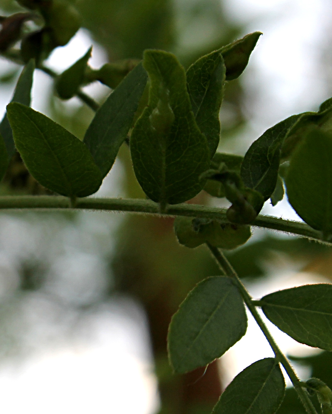 Bejlomorka dřezovcová (Dasineura gleditchiae) , hálky, Gleditsia triacanthos 'Sunburst', Gymnázium Brno-Řečkovice